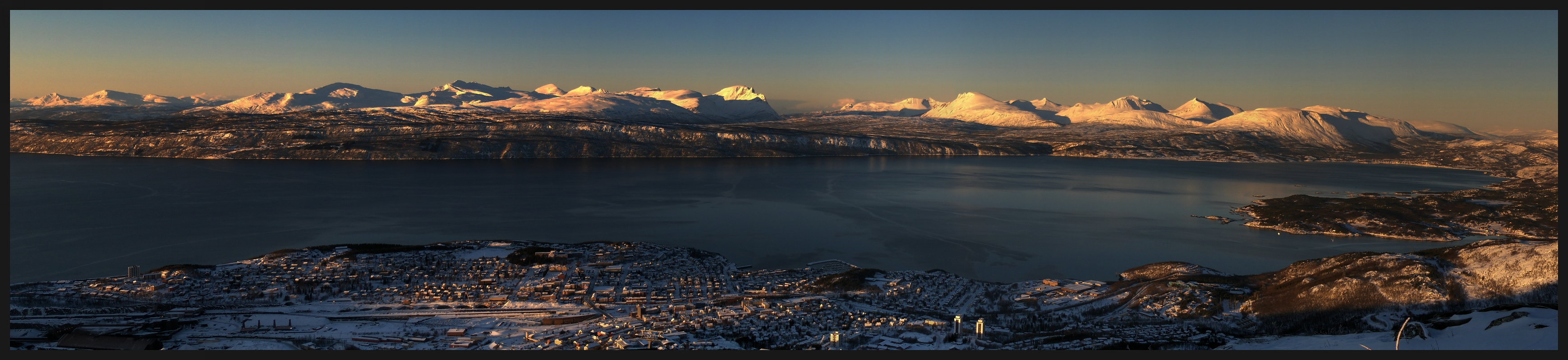 Panorama Narviku